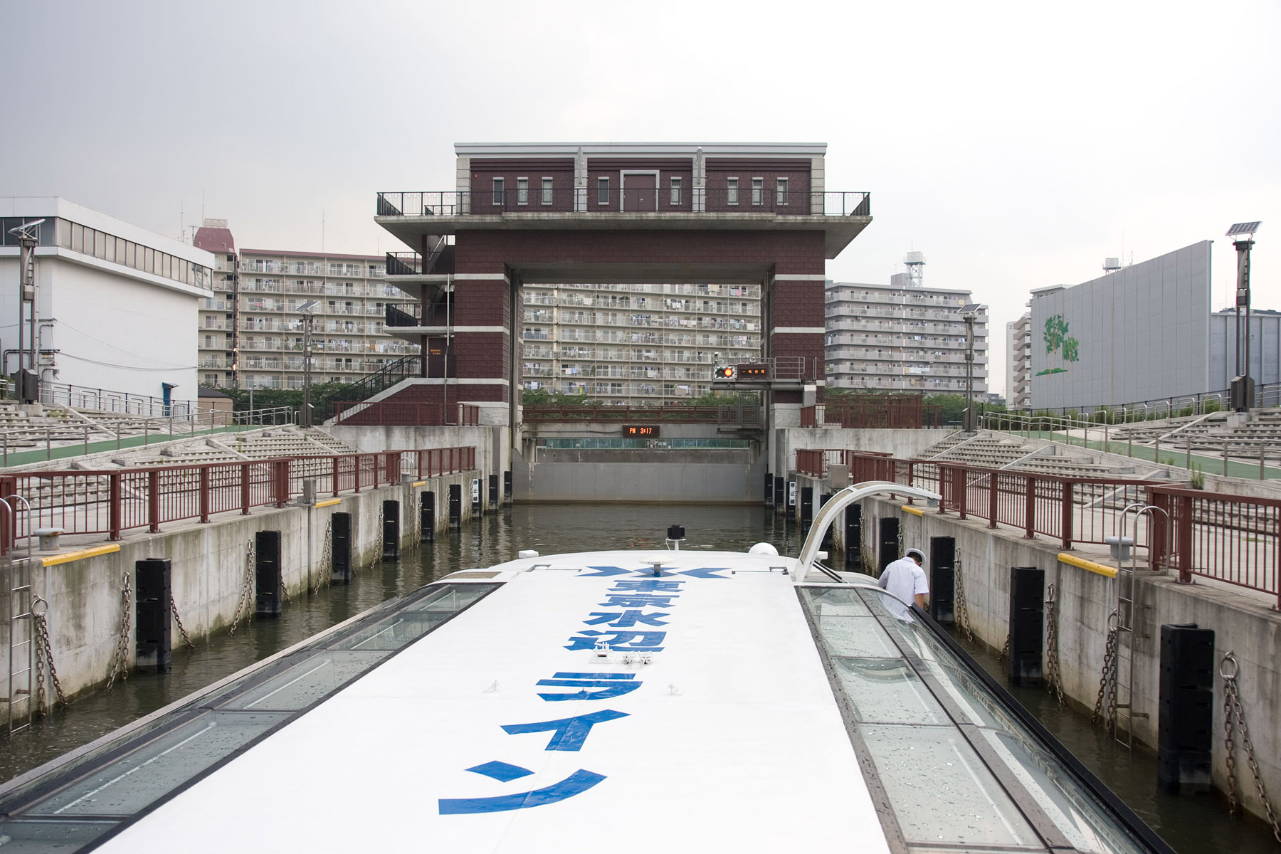 荒川ロックゲートを通過中（東京水辺ライン乗船中）